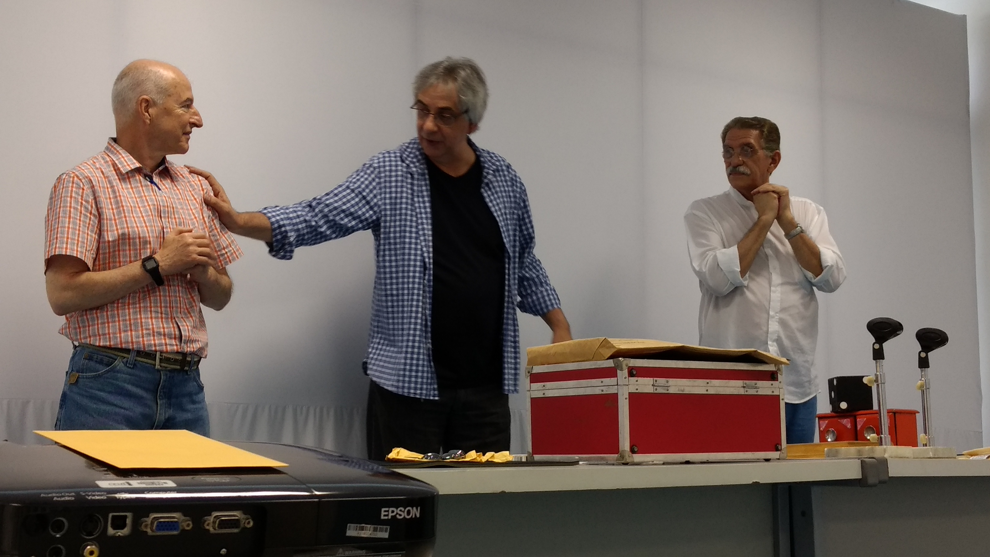 A 1ª Edição da Semana USP de Ciência e Tecnologia abre as portas da Universidade com dezenas de atividades gratuitas em São Paulo e Santos. Entre os dias 18 e 22 de outubro, a Universidade de São Paulo realiza a Semana USP de Ciência e Tecnologia. O evento, coordenado pelas Pró-Reitorias de Cultura e Extensão Universitária e de Pesquisa da USP, faz parte da Semana Nacional de Ciência e Tecnologia, cujo intuito é aproximar os temas da população. Em Santos, o Monumento Nacional Engenho dos Erasmos também oferece atividades. Leia mais aqui.